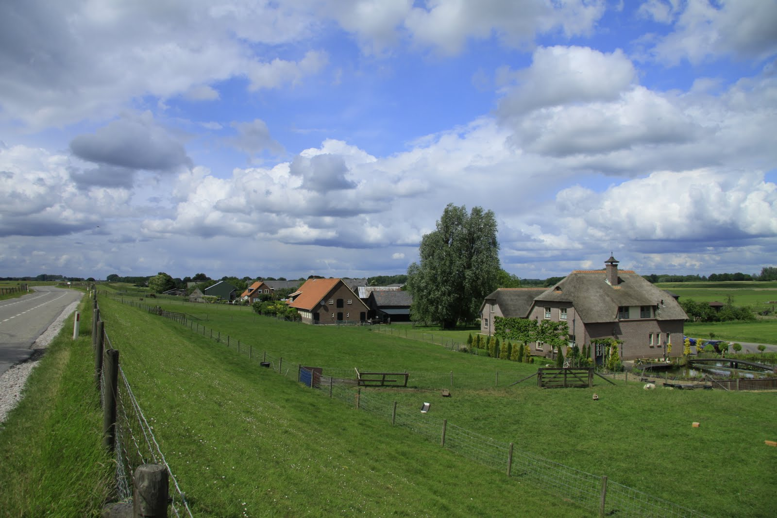 Buurtschap Den Oord, nog steeds geen plaatsnaambord!.